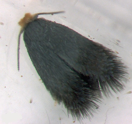 Pectinivalva xenadelpha